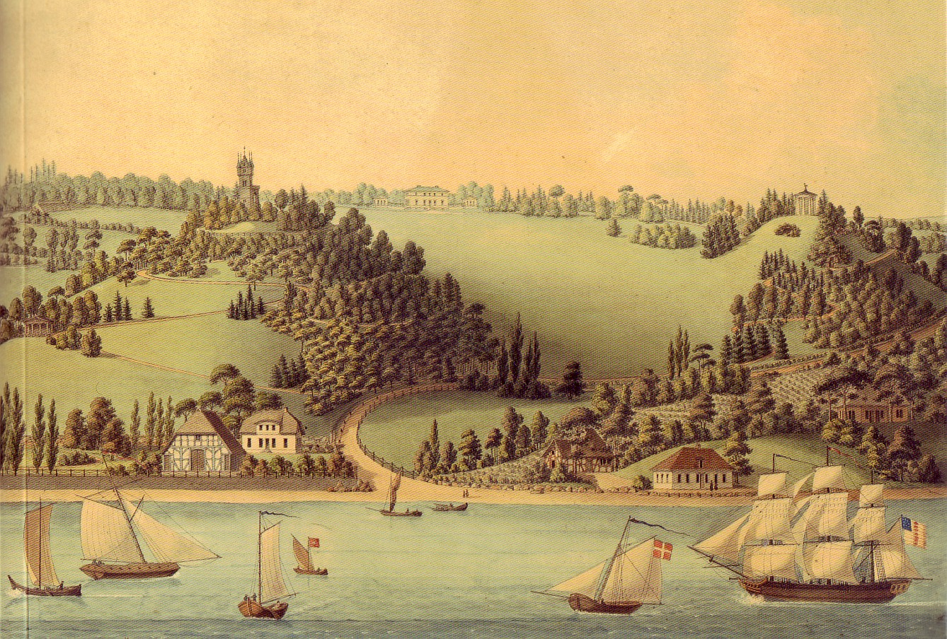 Joseph Ramée (1764-1842), Architekt: Ansicht von Baurs Park in Hamburg-Blankenese.